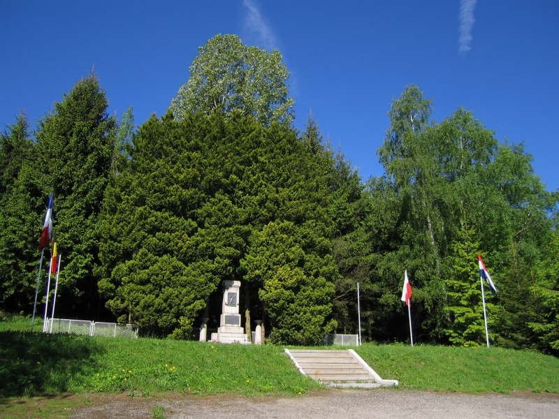 Hrob společný - transportu smrti (Omlenice), při lese, Omlenice